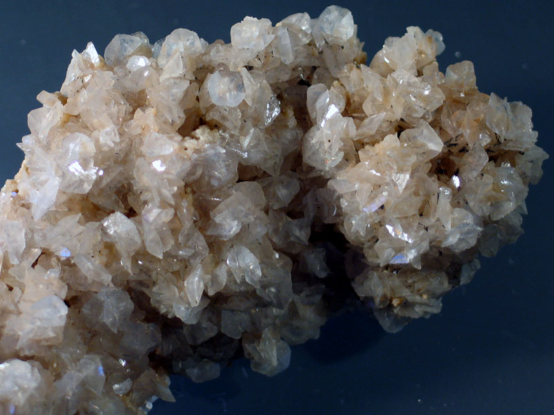 minerał; dolomit, pseudomorfoza po kalcycie, pochodzenie Rumunia; autor zdjęcia Stowarzyszenie Spirifer, 14.08.2006r.